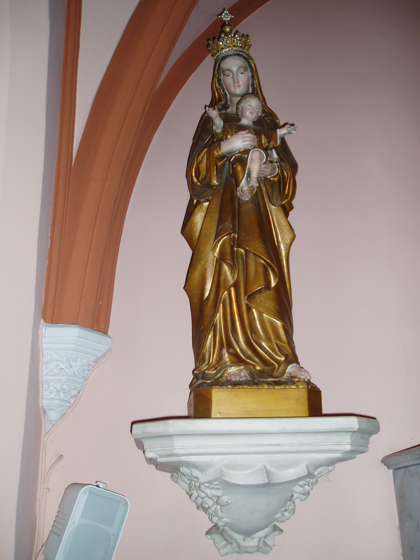 Statue de la Vierge